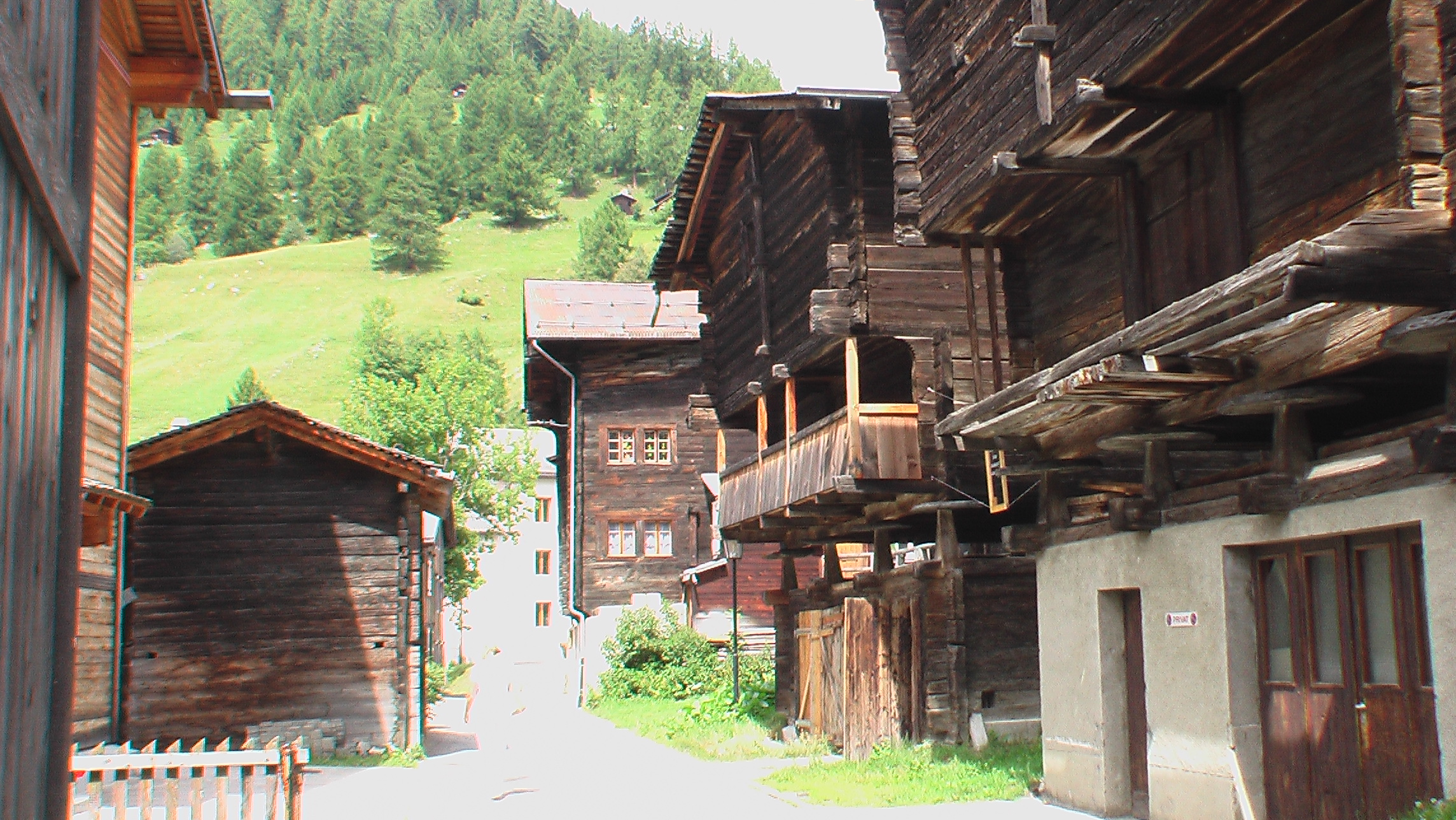 MünsterVSSchweizHolzhäuser2008-2